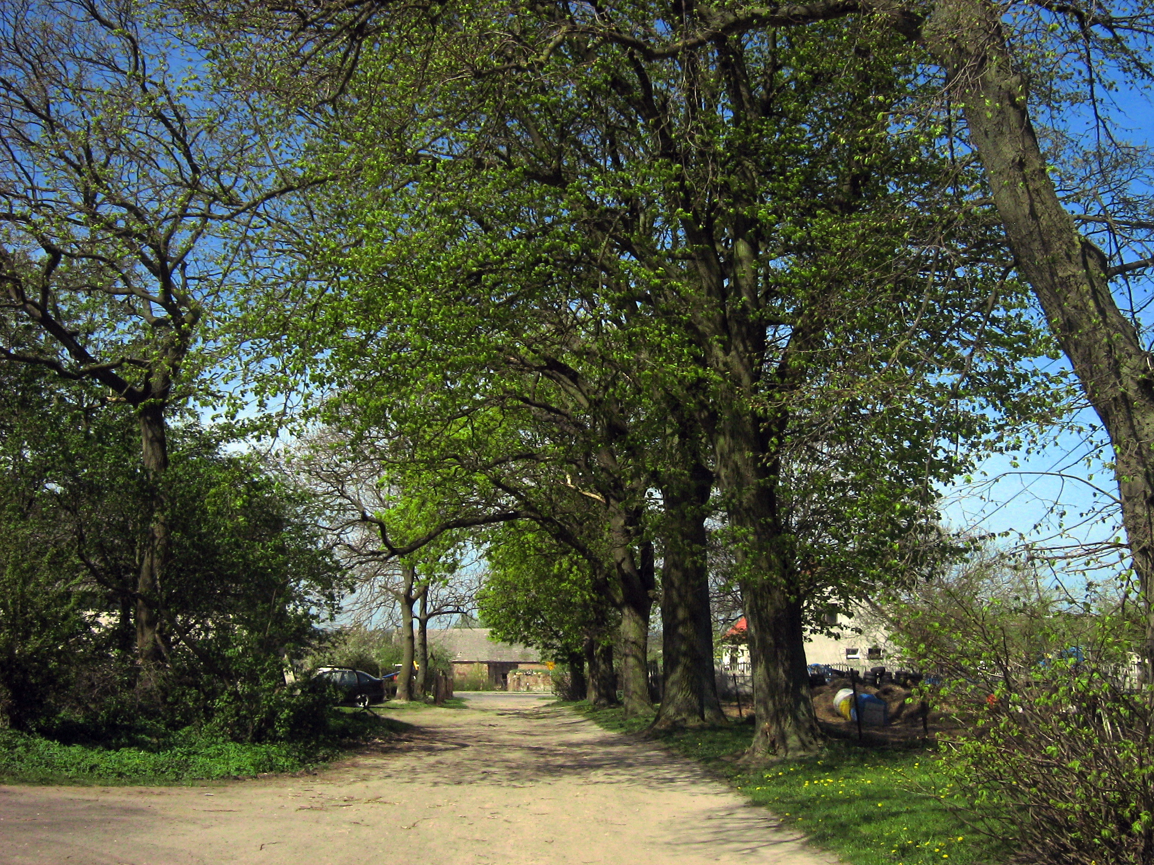 Aleja drzew w Korzęcinie